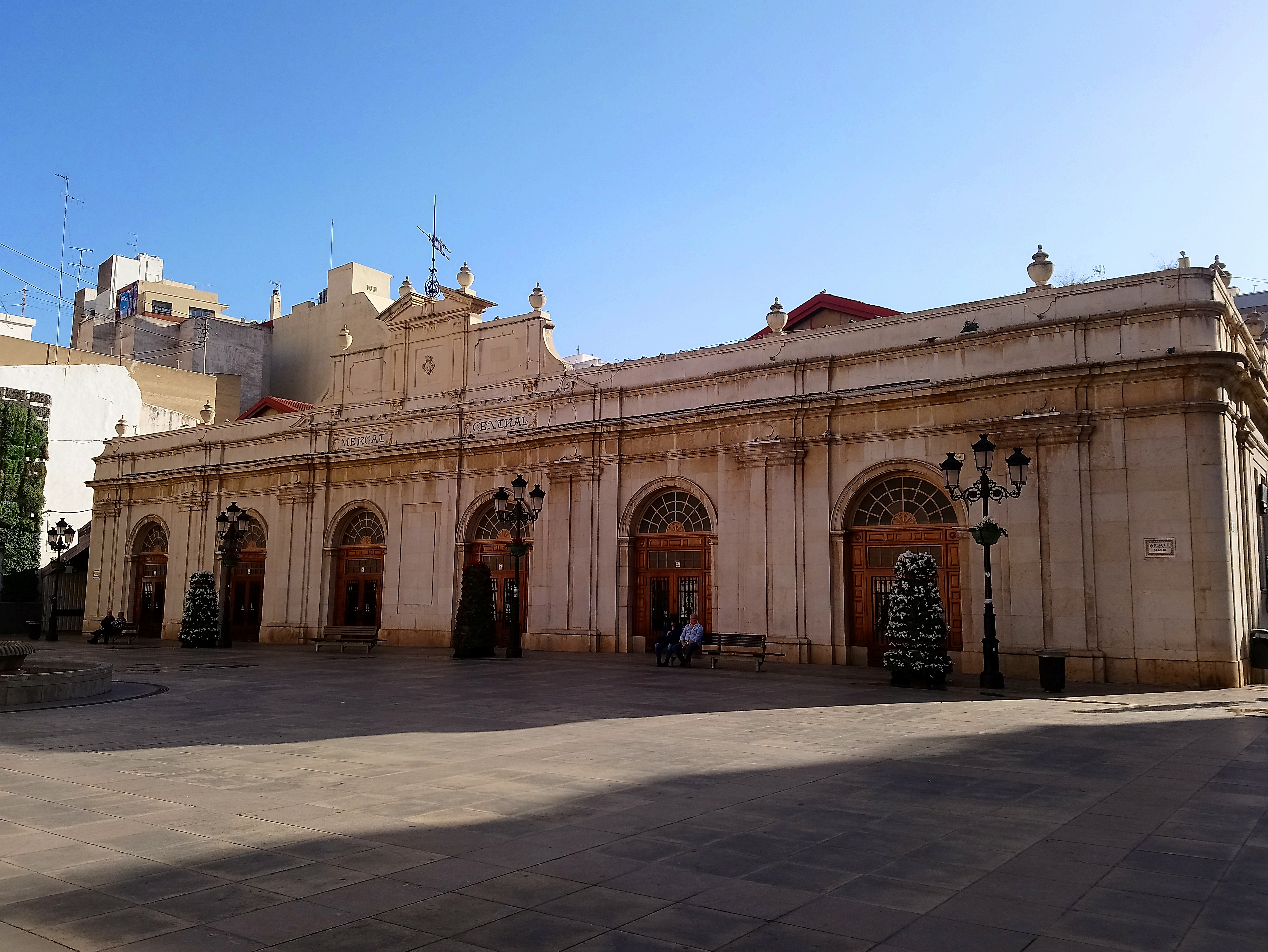 Mercado Central Castellón